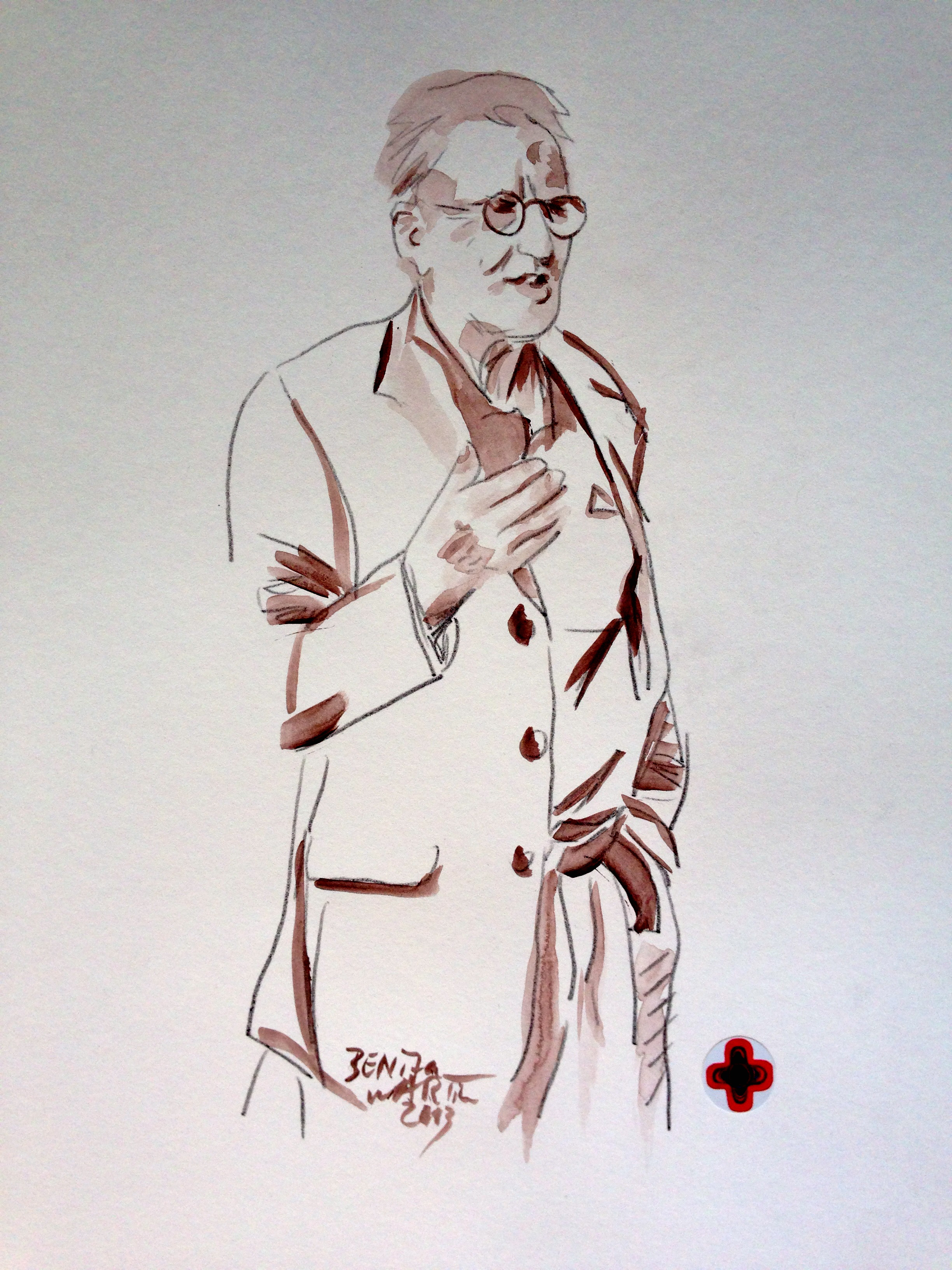 Porträt, Acryl, Blei, Kohle, ADA Dimensionsmalerei®, Benita Martin